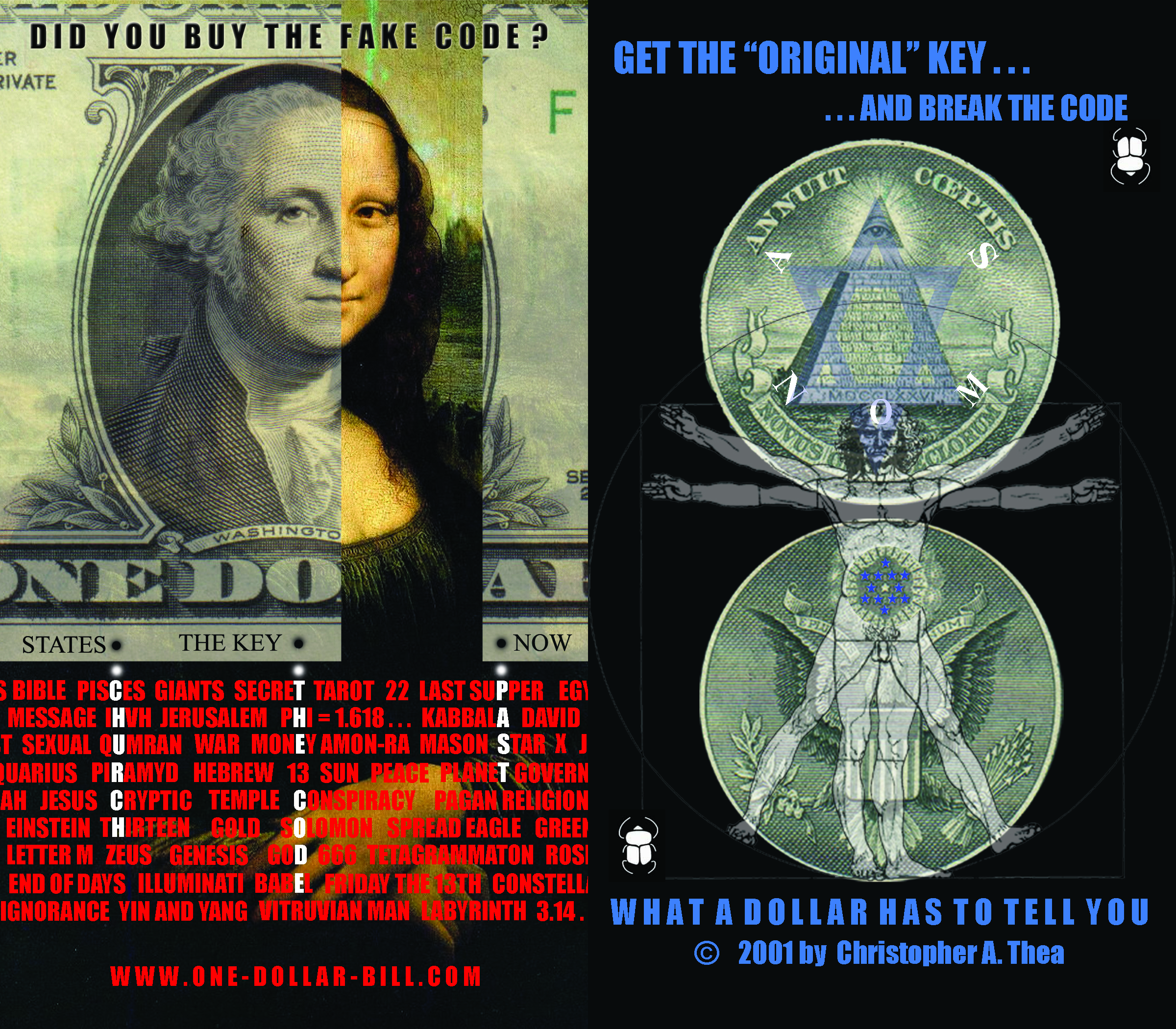 El Simbolo perdido de Dan Brown y la simbologia hallada por Christoper Thea